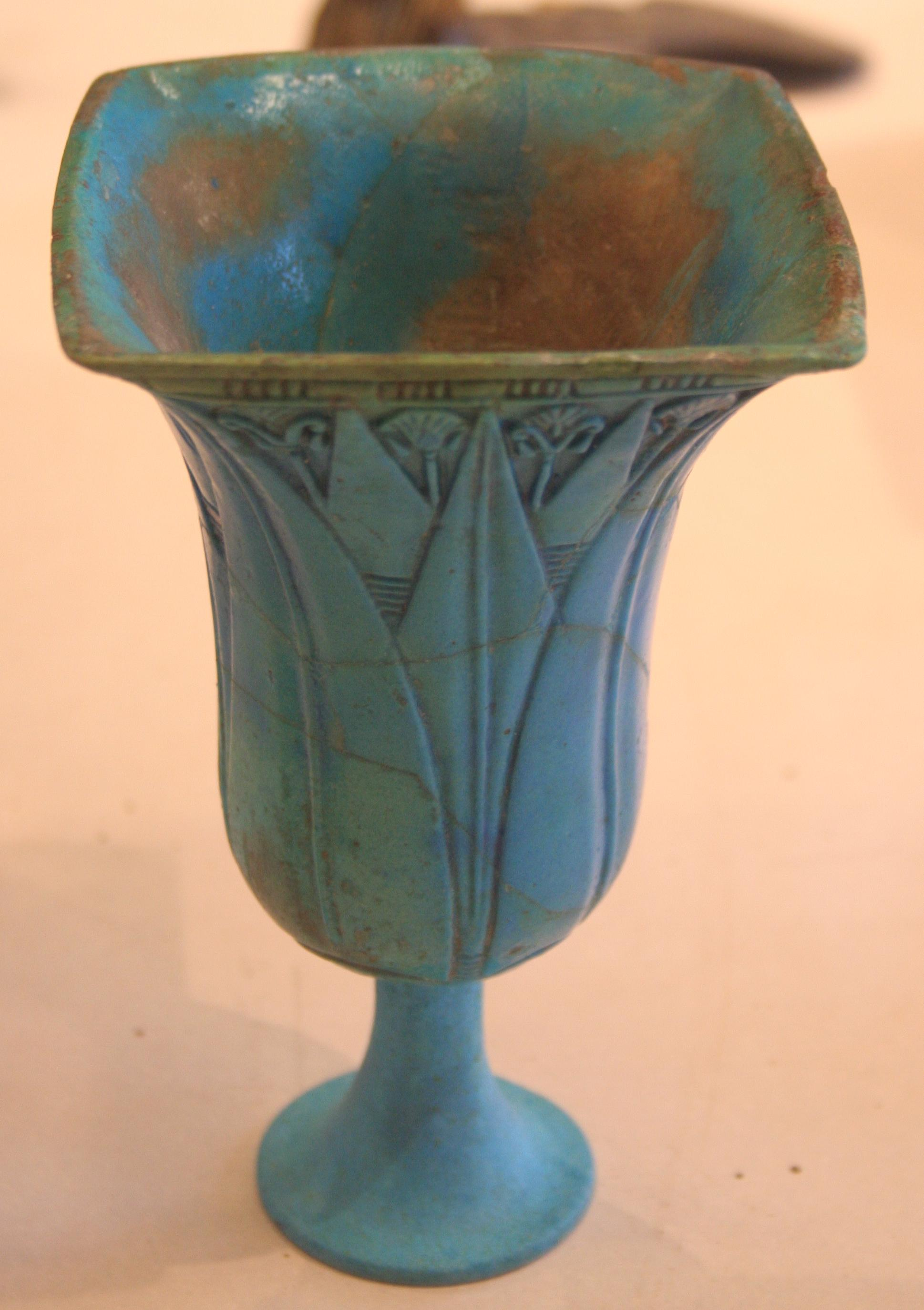 Calice en forme de nénuphar (faïence siliceuse) 22e dynastie, 945 - 715 avant J.-C.